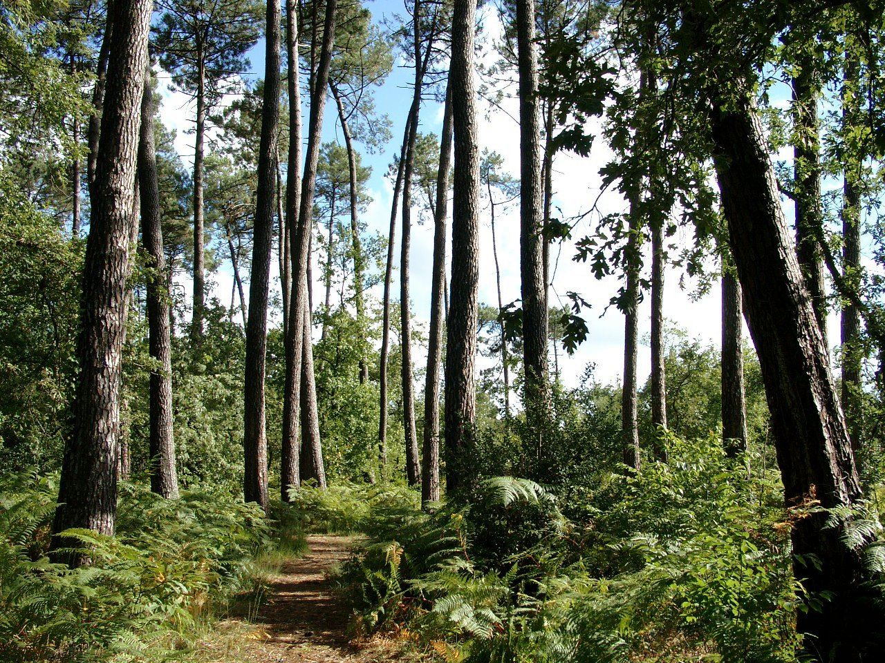 Pinède-chênaie du Parc du Château, Mérignac (Gironde).